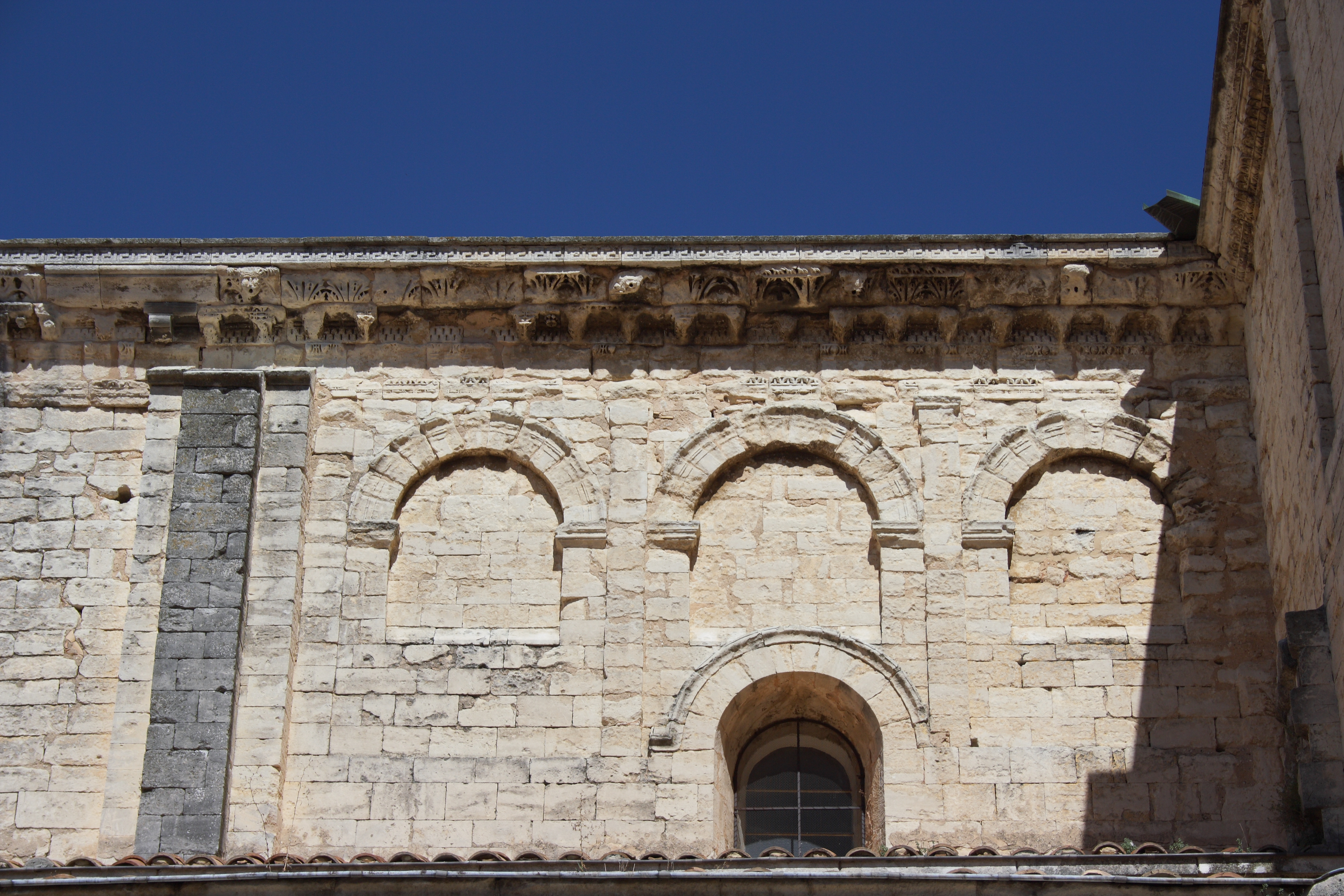 Kathedrale Notre-Dame in Saint-Paul-Trois-Châteaux